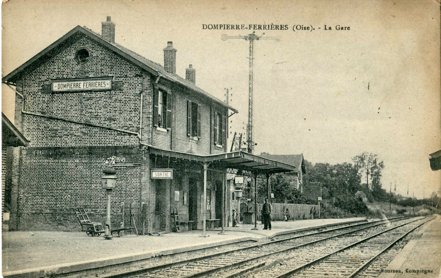 Carte postale ancienne éditée par Boursez à Compiègne DOMPIERRE - FERRIERES : La gare